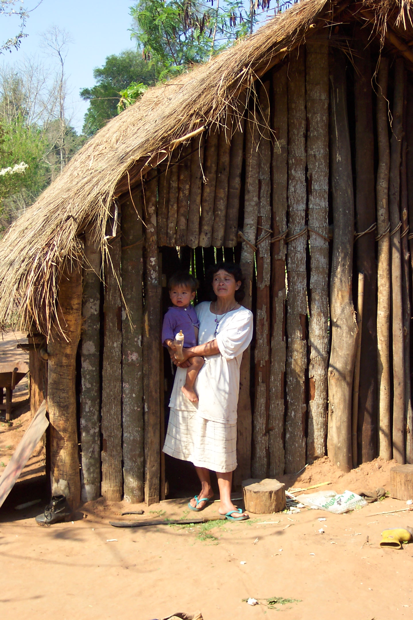 Tribo Indigena no Paraguai